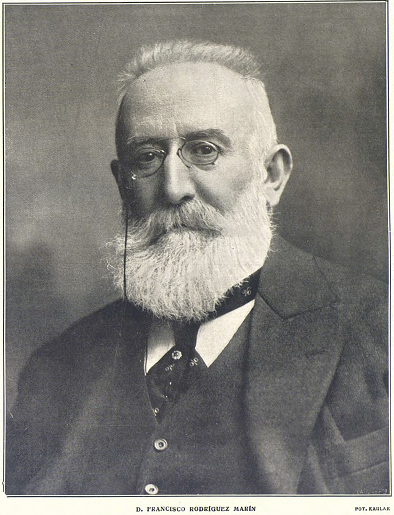 Retrato de Francisco Rodríguez Marín, obra del fotógrafo Kaulak, recogido en la revista española La Esfera.